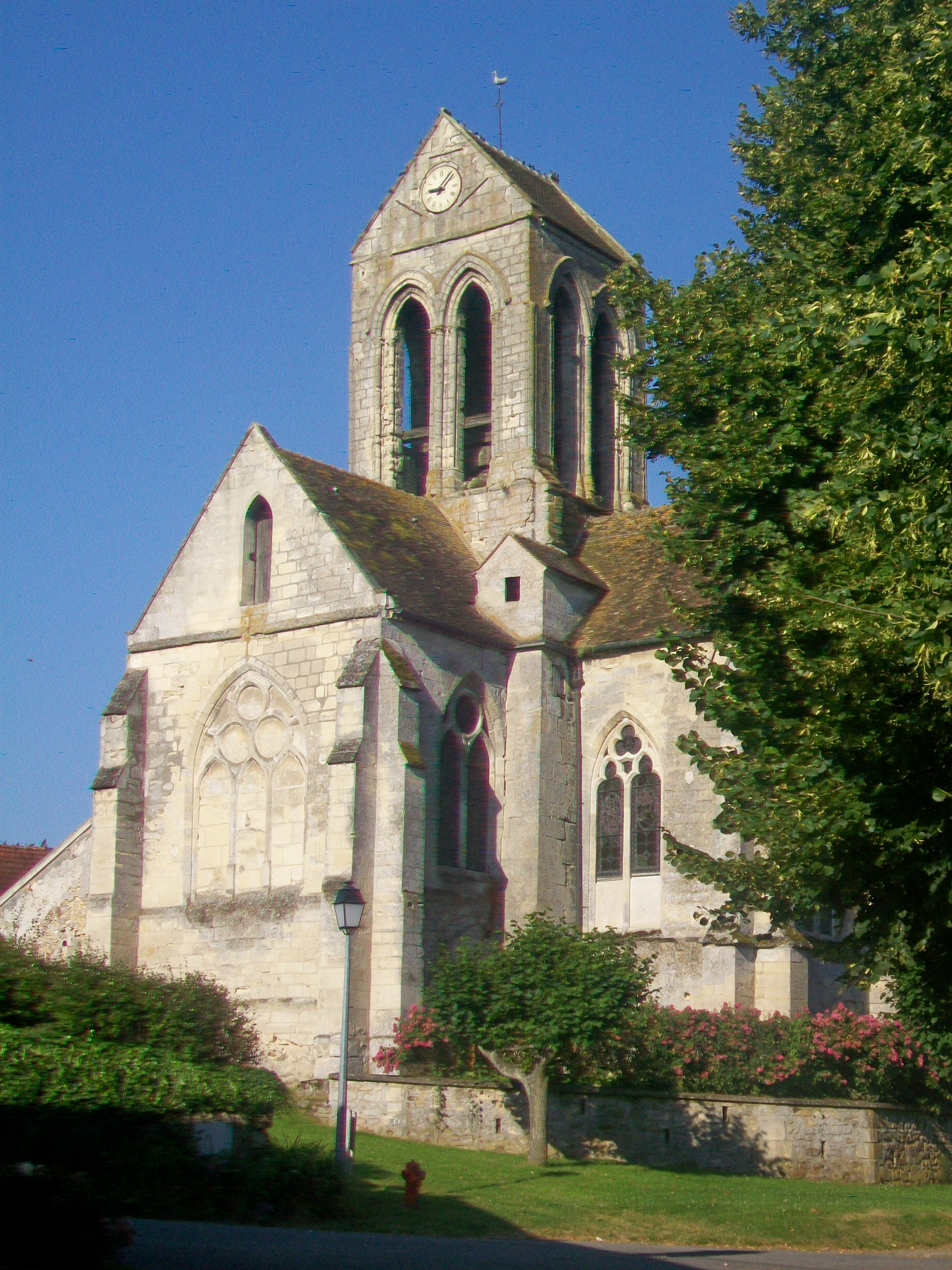 Le chevet et le clocher, depuis l'est.